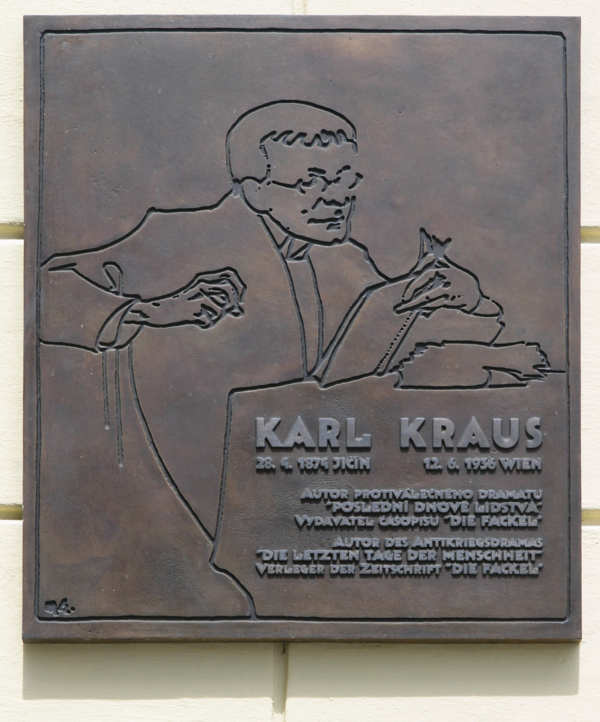 Česky: Jičín, Fortna - pamětní deska Karla Krause